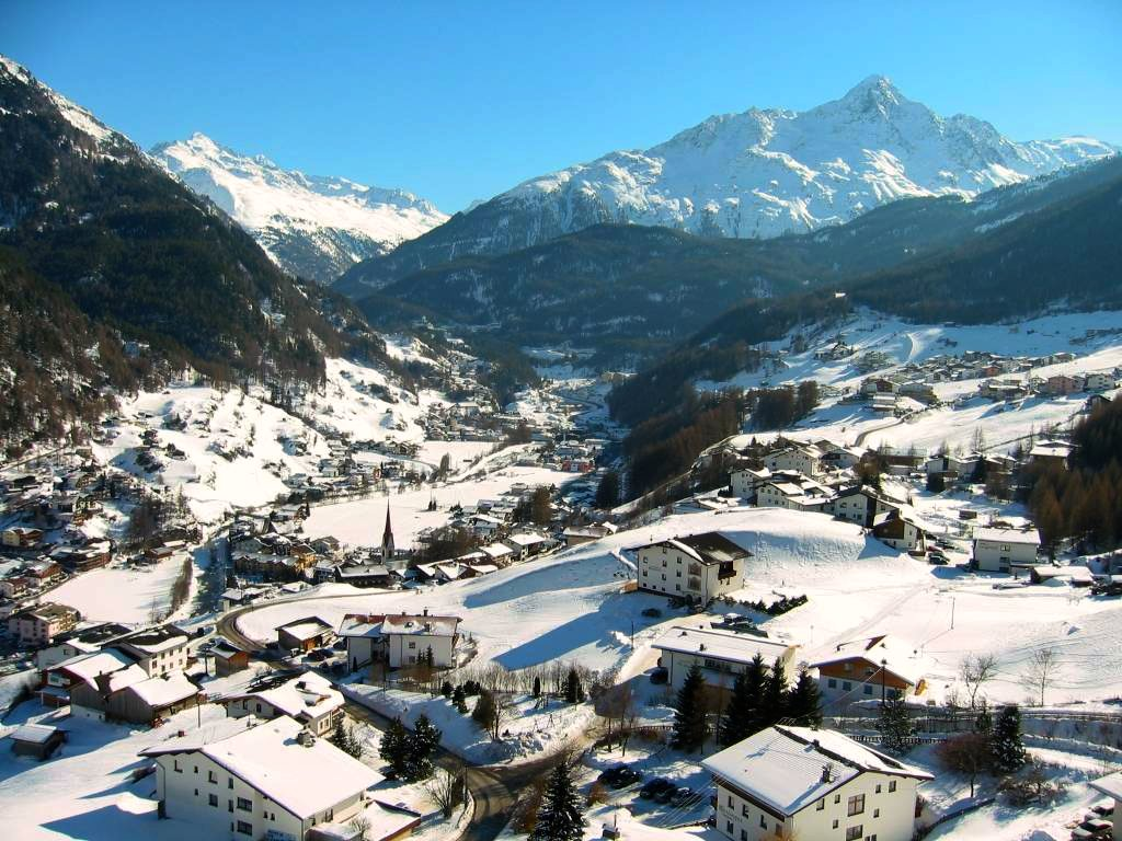 Sölden 2005.